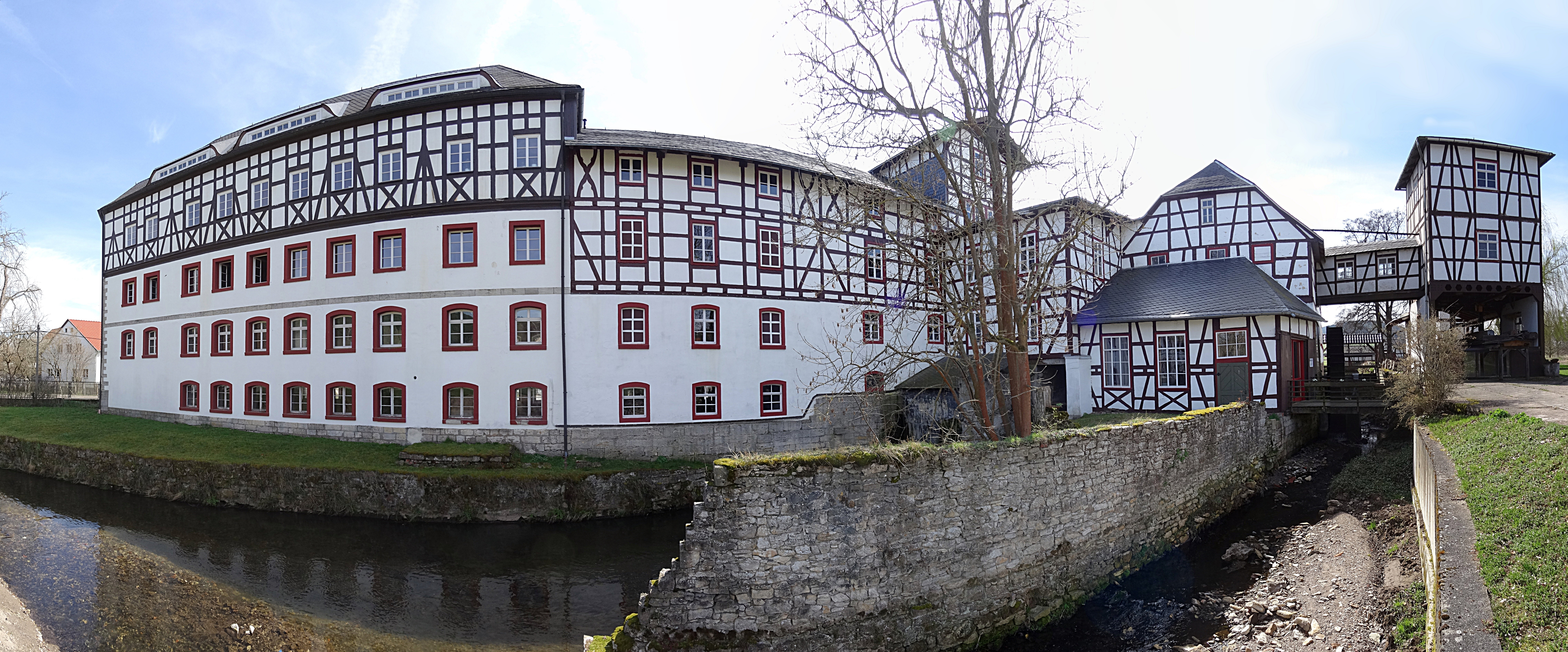 Panorama Wassermühle Kleinhettstedt von Norden